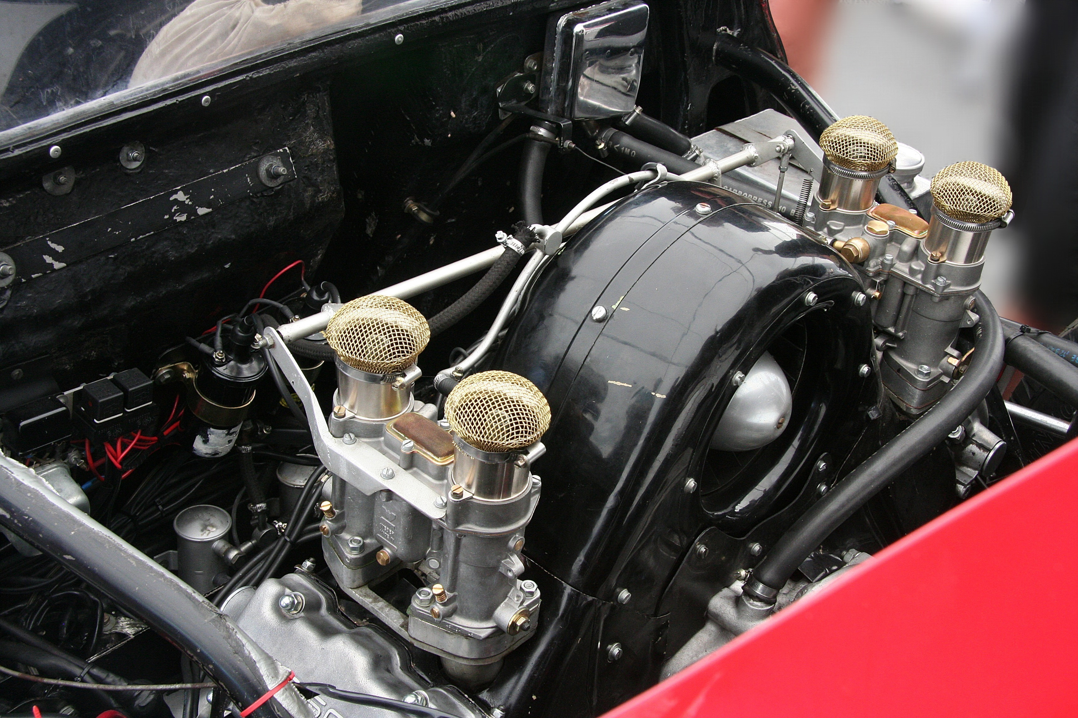 Fuhrmann-Motor mit nicht originalen Vergasern im Porsche 904